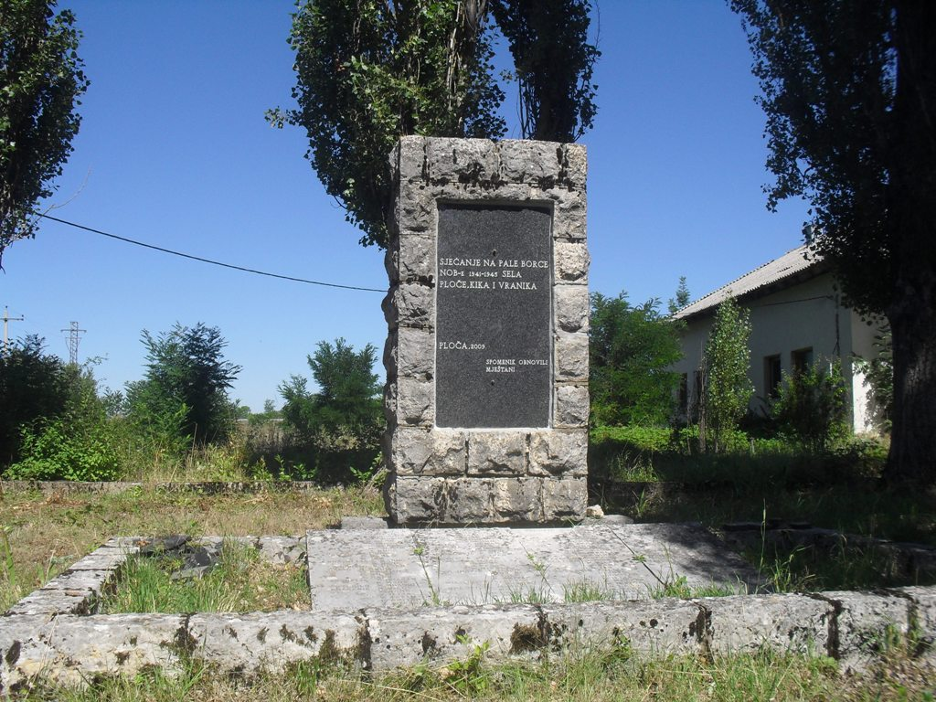 Spomenik borcima NOB-a iz sela Gornja Ploča, Kik i Vranik. Nalazi se u Gornjoj Ploči, u Ličko-senjskoj županiji. Obnovljen je 2009.